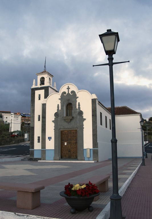 Iglesia de San Isidro. El Chorrillo (El Rosario)